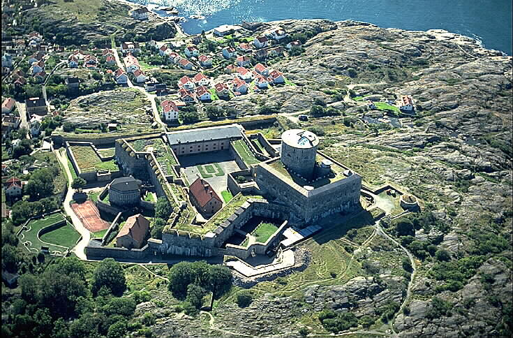 Carlstens fästning började byggas 1658 och fick nuvarande utseende 1857. Kanske mest känd som ett fängelse, så var det dock ett av Sveriges starkaste befästningar mot danskarna. Motiv: Carlstens fästning Nyckelord: Byggnadsminnen:Statl, Flygbilder, Riksintressen Kategori: Fästning Carlstens fästning började byggas 1658 och fick nuvarande utseende 1857. Kanske mest känd som ett fängelse, så var det dock ett av Sveriges starkaste befästningar mot danskarna.